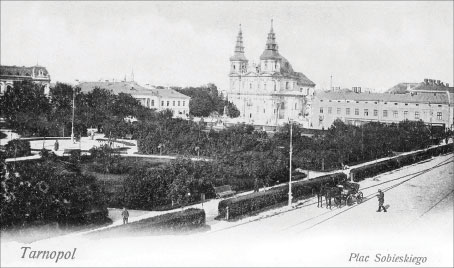 Площа Собеського в Тарнополі. Нині Майдан Волі.